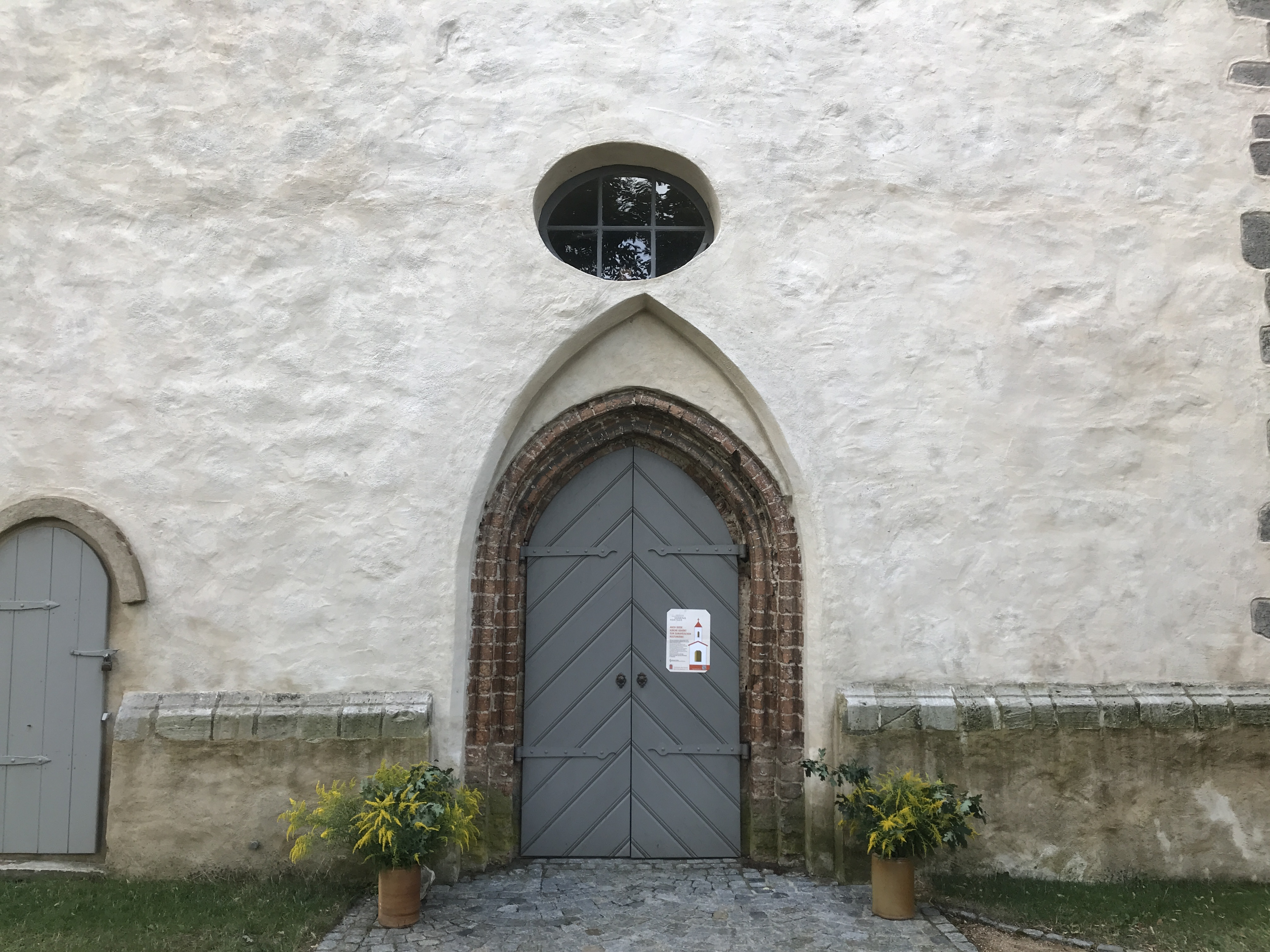 Die Dorfkirche Steinhöfel im Landkreis Oder-Spree in Brandenburg ist eine Feldsteinkirche aus der zweiten Hälfte des 13. Jahrhunderts. Im Innern steht unter anderem ein Altaraufsatz aus dem Anfang des 18. Jahrhunderts.